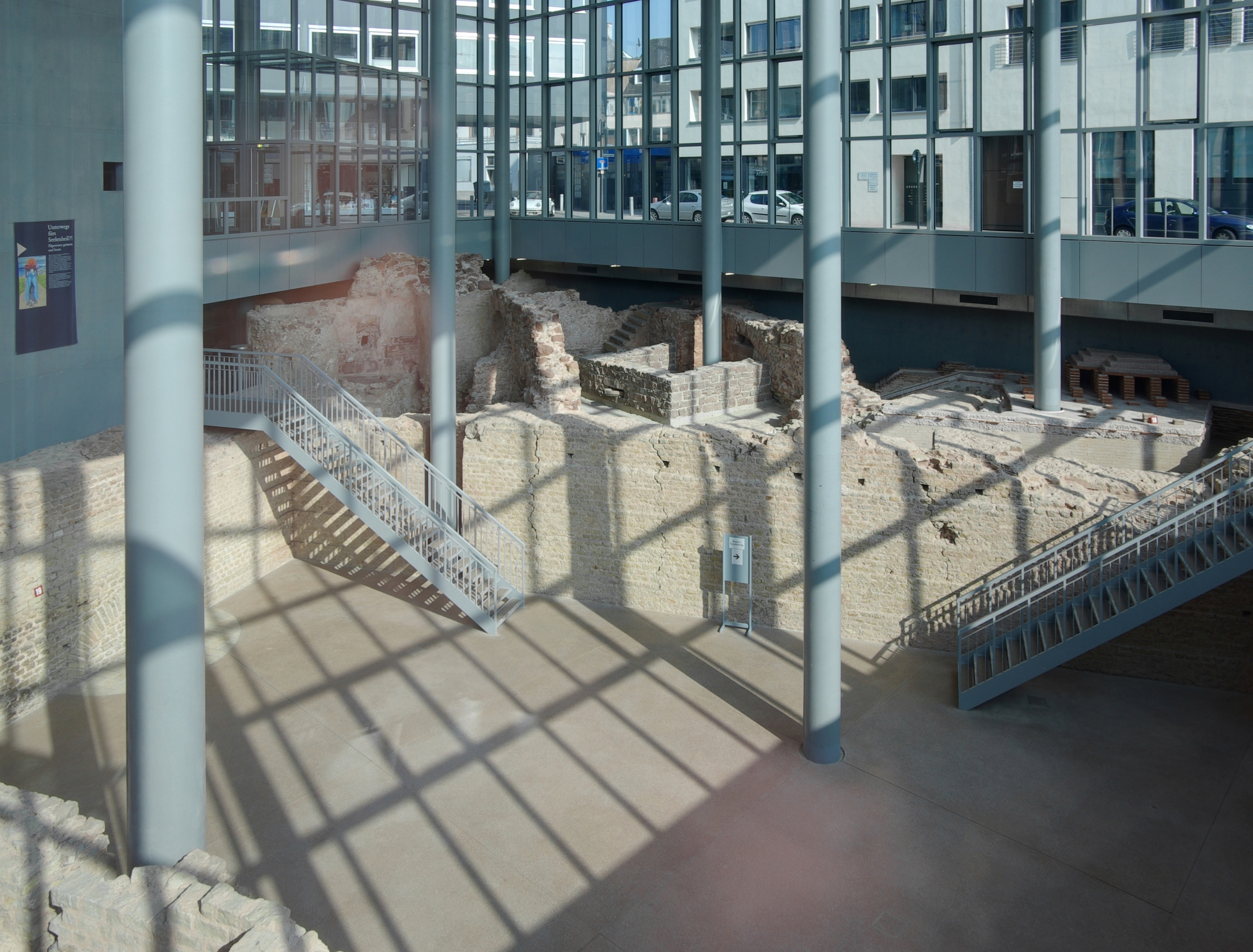 Trier, Thermenmuseum, Architekt: Oswald Mathias Ungers